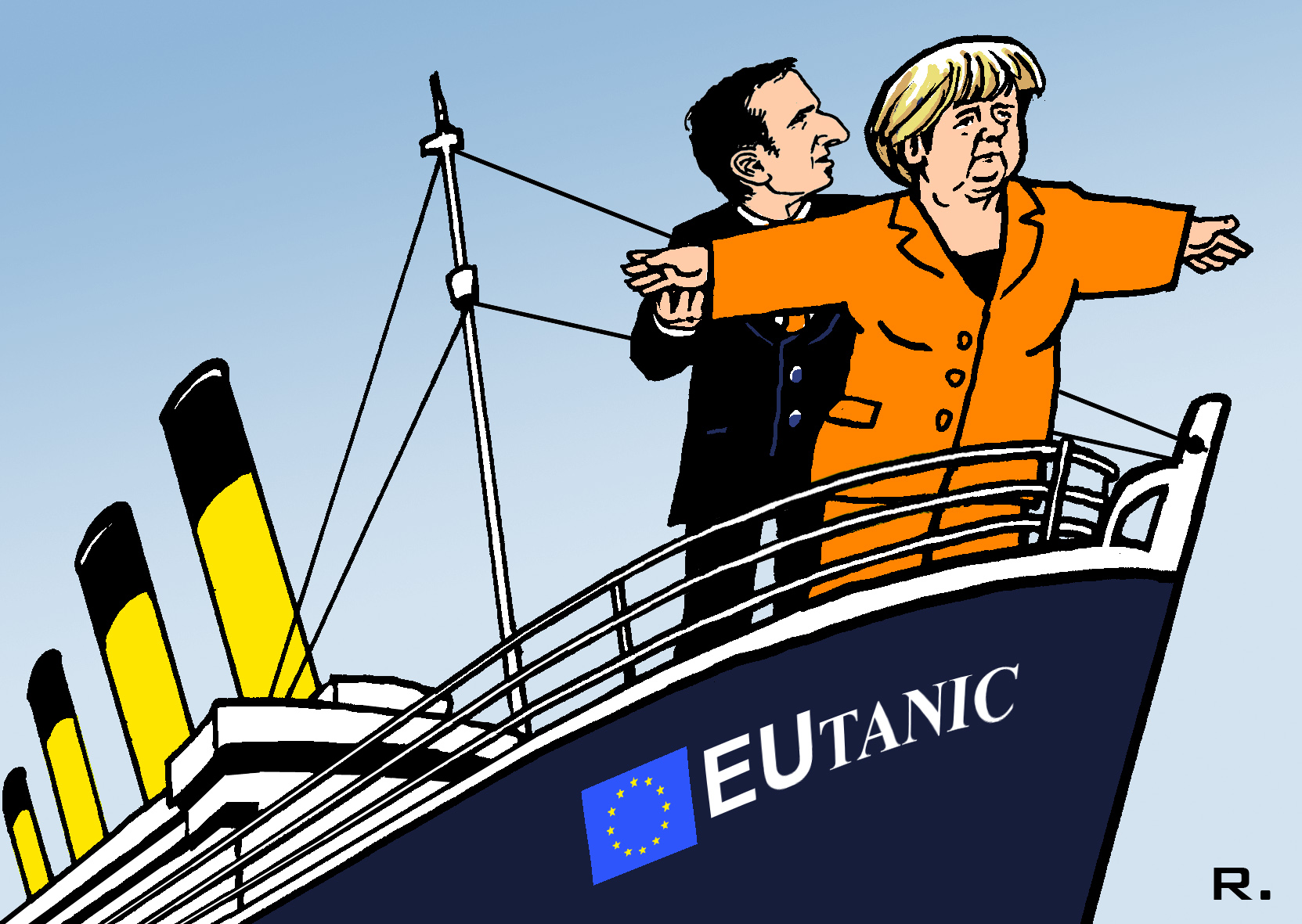 Das neue "dynamische" Führungs-Duo der EU erinnert an das Protagonisten-Pärchen eines bekannten Monumental-Films.